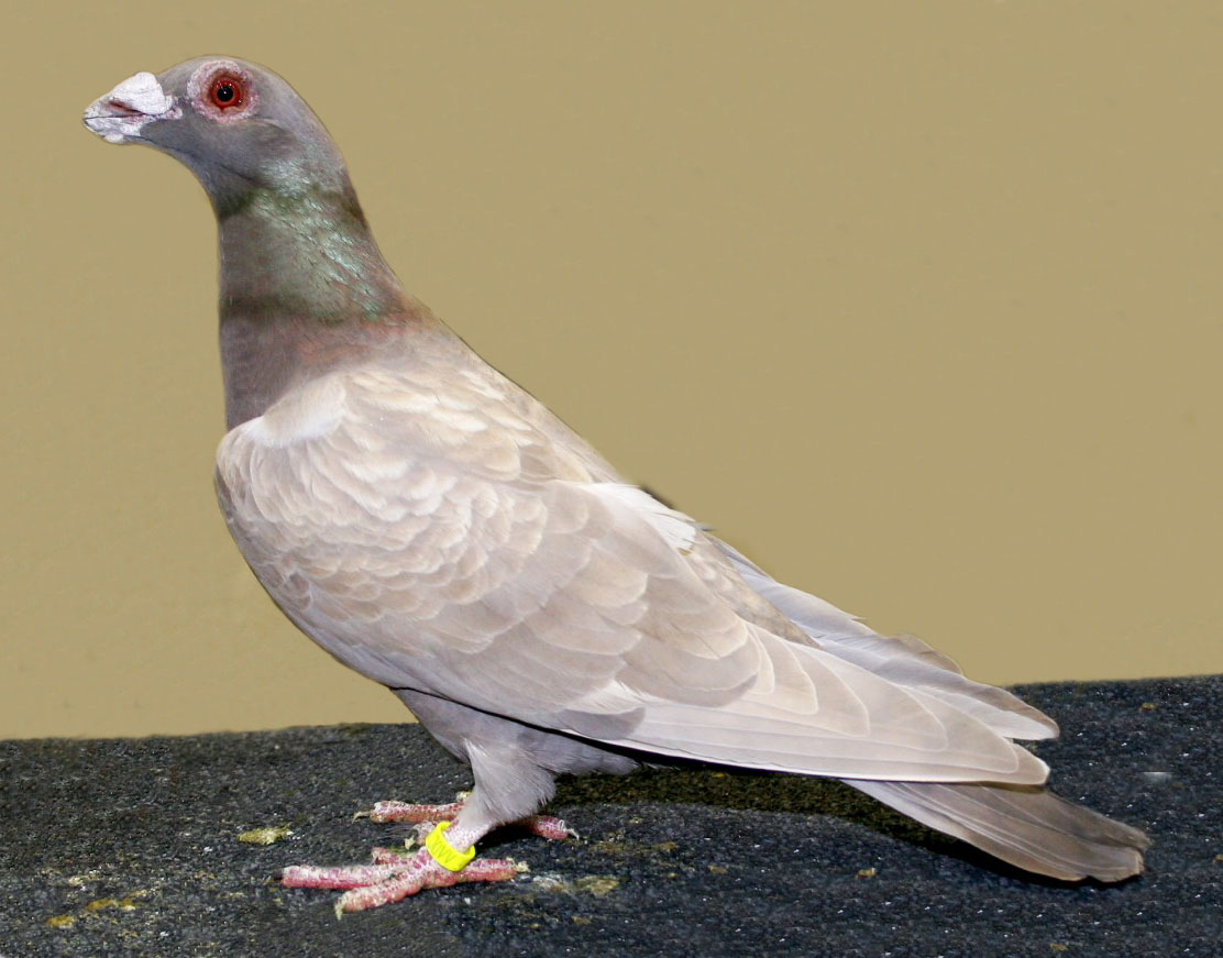 Dragoon Pigeon